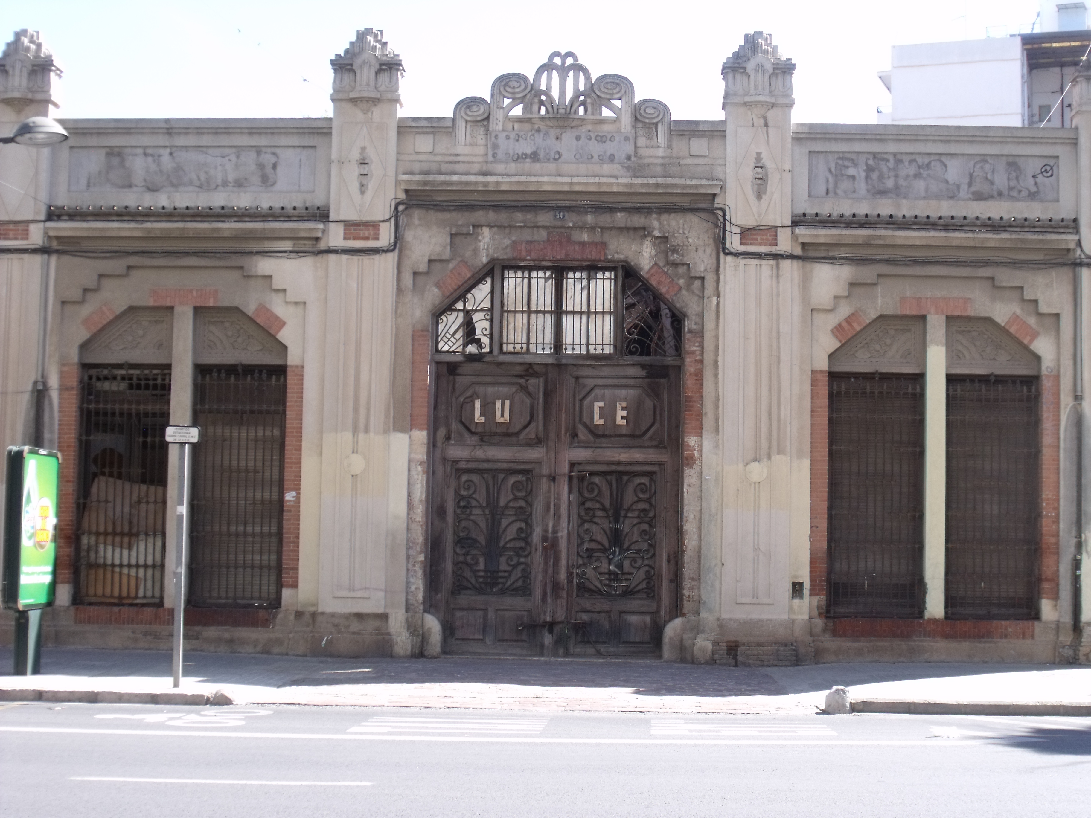 Antiguas instalaciones de Bombas Gens junto a la avenida de Burjassot, Valencia (España).